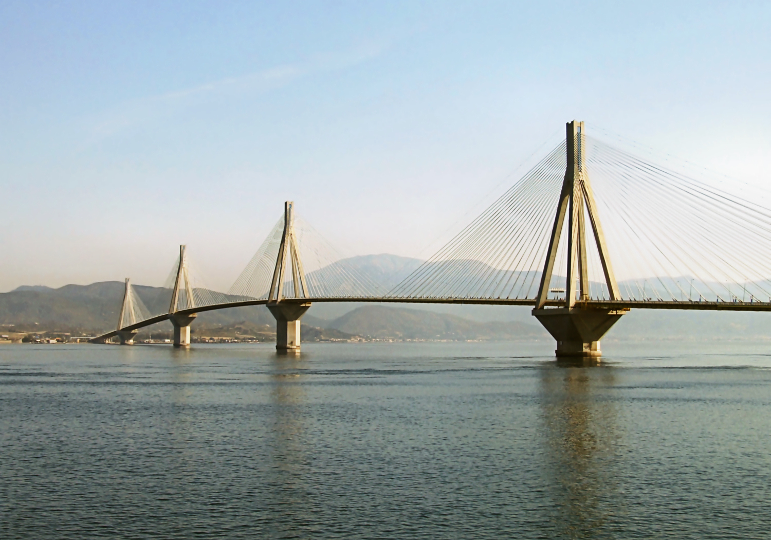 Most Rio-Antirio